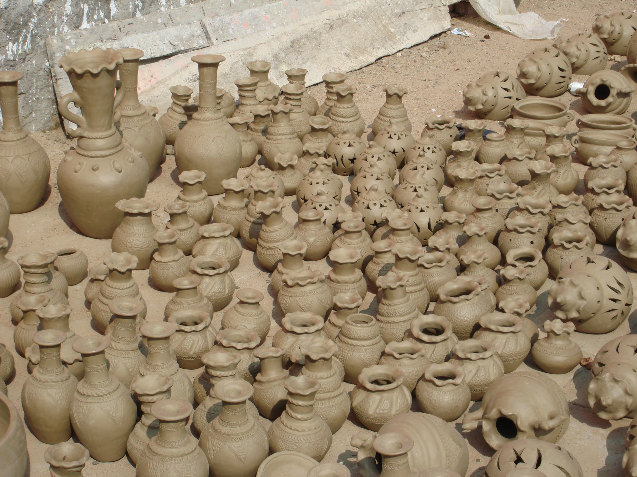 Gốm Bàu Trúc. Tôi sáng tạo ra toàn bộ tác phẩm. Làng nghề cổ nhất Đông Nam Á còn tồn tại ở Ninh Thuận